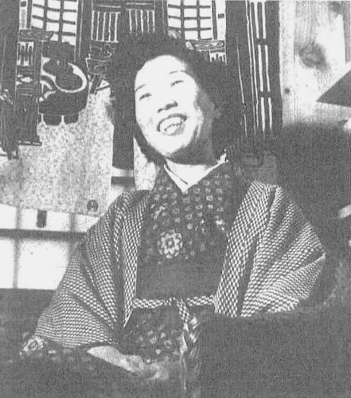 読売新聞社『家庭よみうり』374号（1954年）より田井洋子